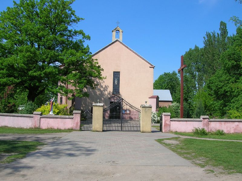 Łyszkowice (pow. łowicki, woj. łódzkie, Polska) – kościół pw. św. Kazimierza.